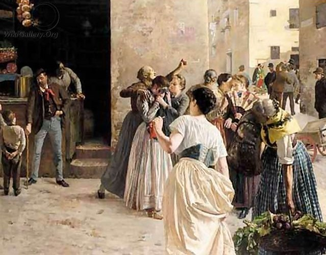 Il ladro, olio su tela, 127 x 157 cm., coll, privata